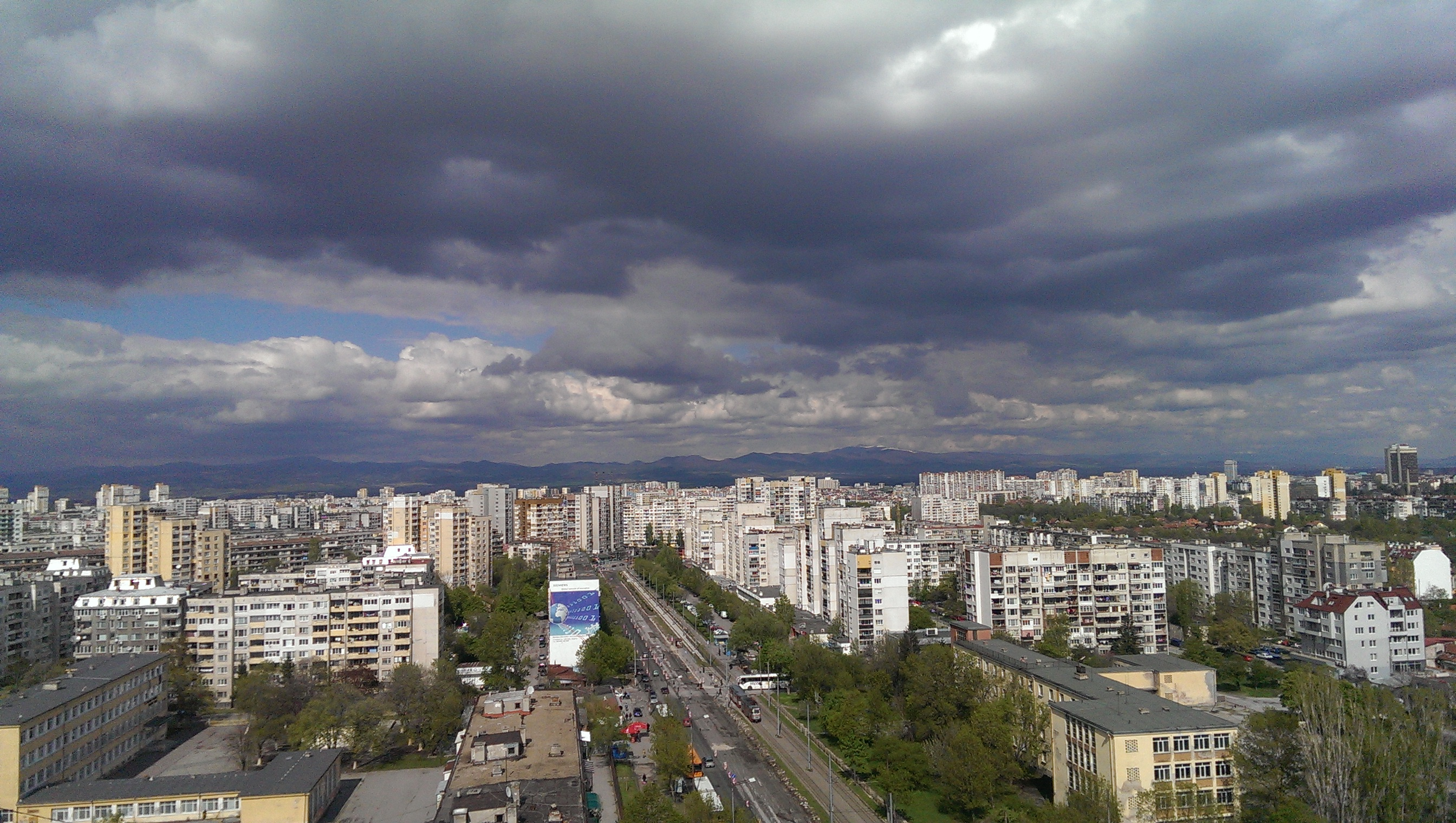 Красна поляна